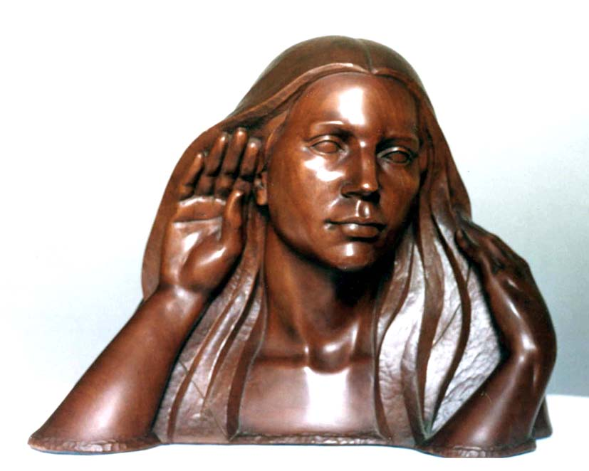 Sensibilidad, talla en madera de caoba por Medina Ayllón